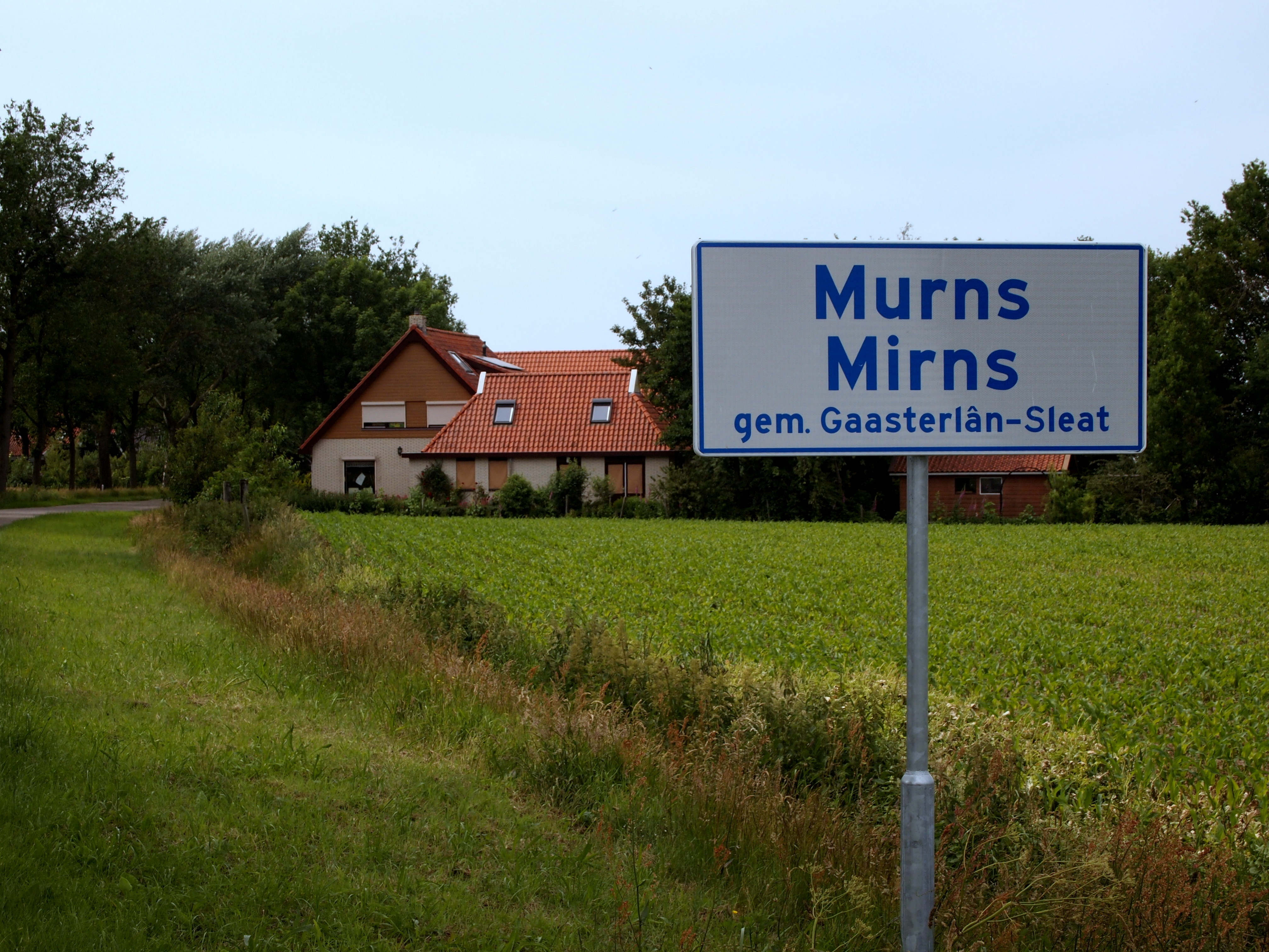 Plaatsnaambord Mirns